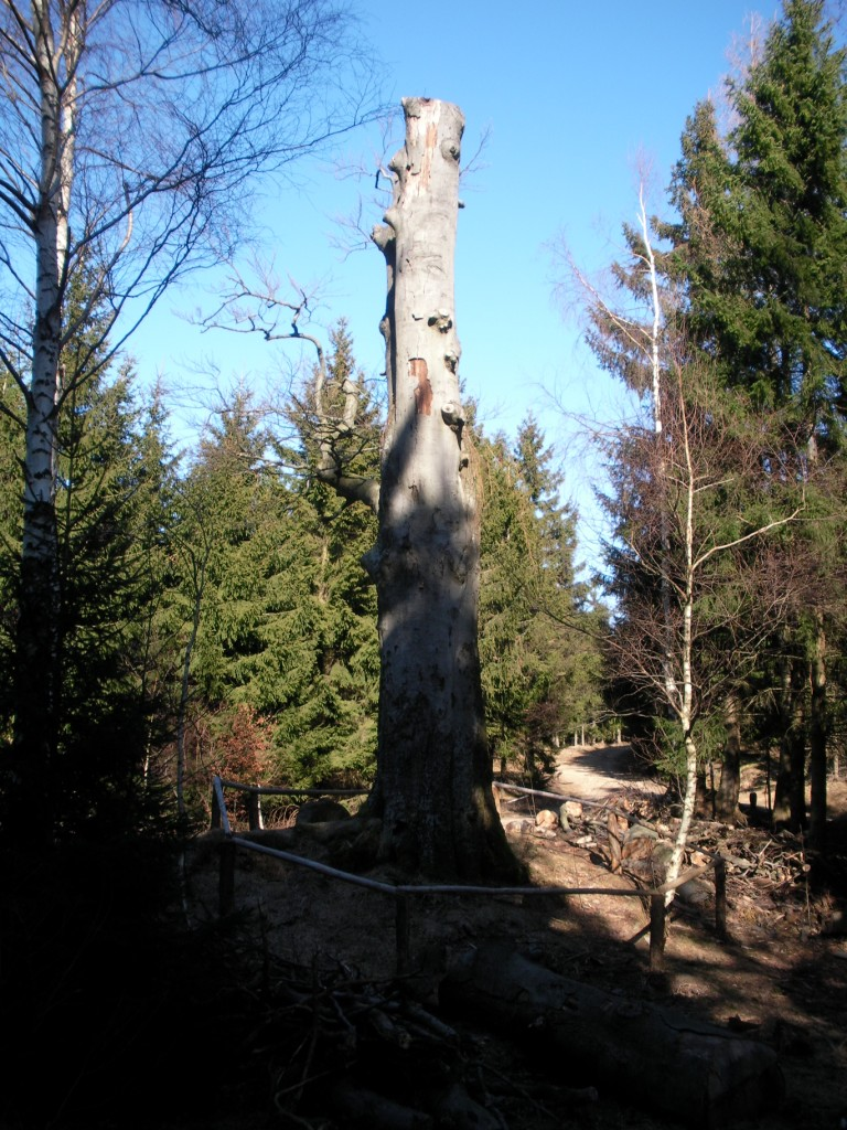 Mönchsbuche bei Wernigerode